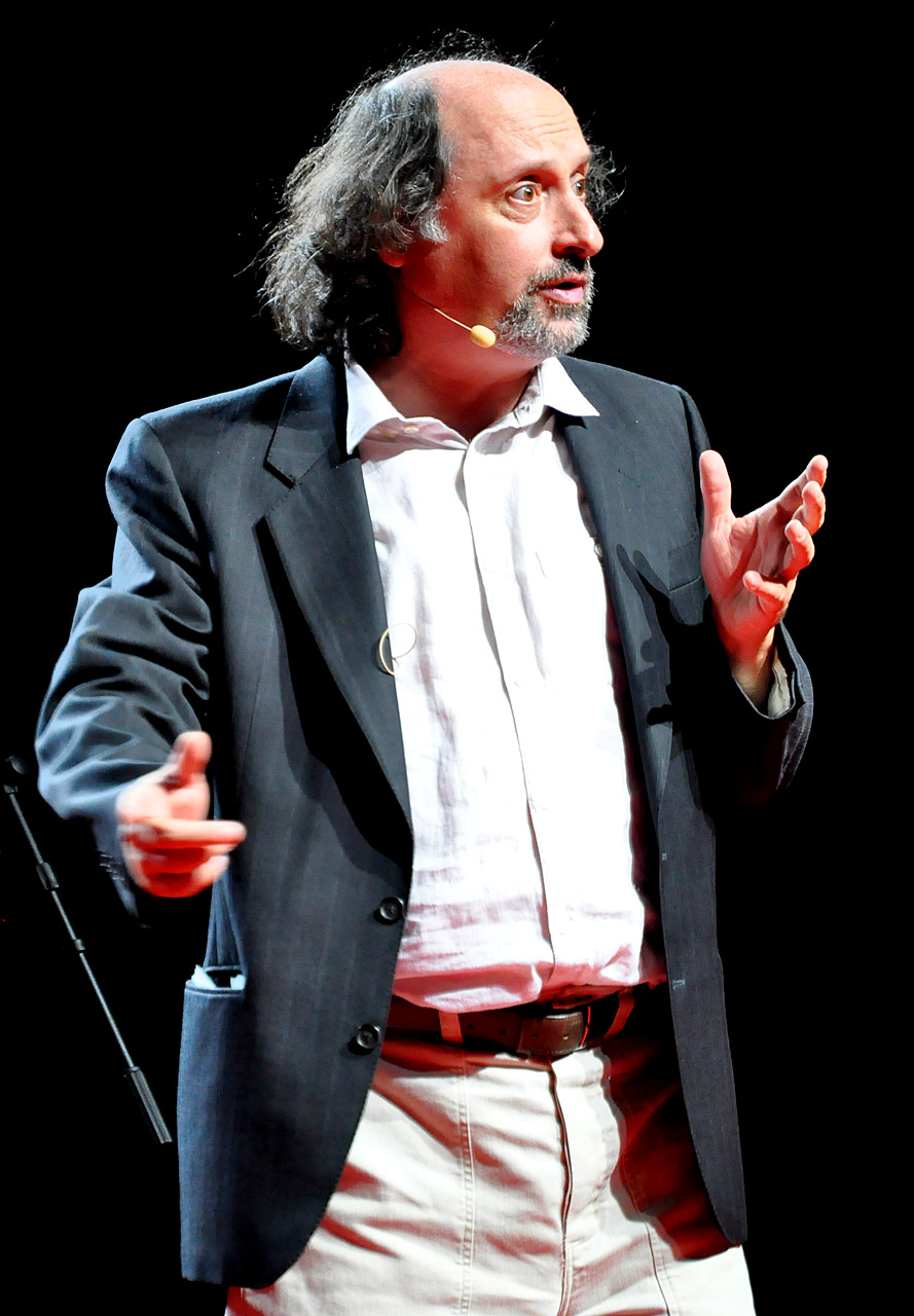 Antonio Cornacchione per Emergency